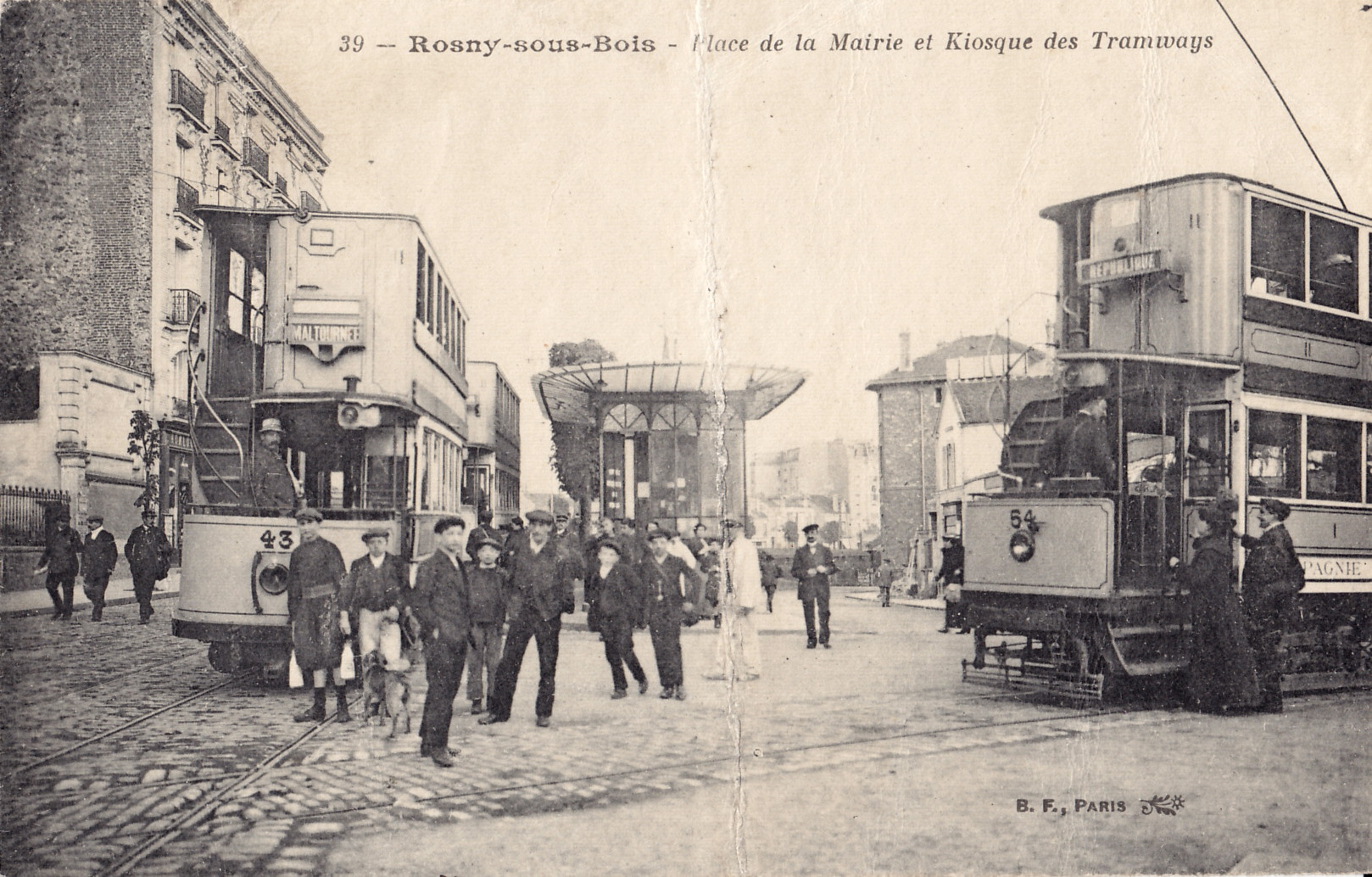 Carte postale ancienne éditée par BF à Paris, n°39 : ROSNY-SOUS-BOIS - Place de la Mairie et Kiosque des Tramways